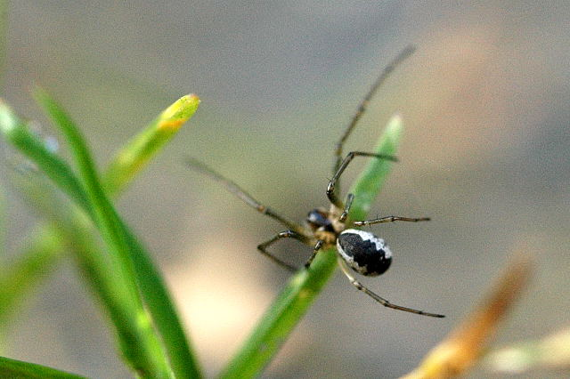 male Neriene peltata from Commanster, Belgian High Ardennes .